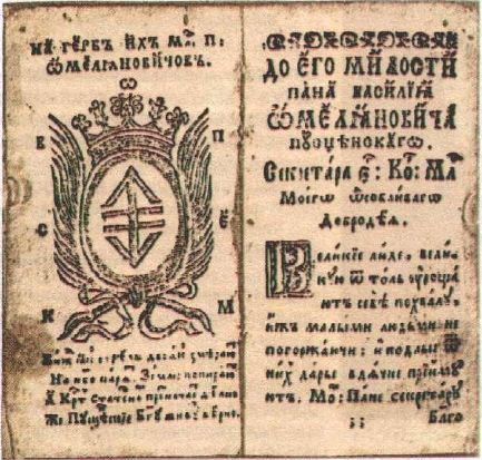 Віленская брацкая друкарня. Малітвеннік. Вільня, 1702. Герб і пачатак прысвячэння В. Амельяновічу-Пусценскаму